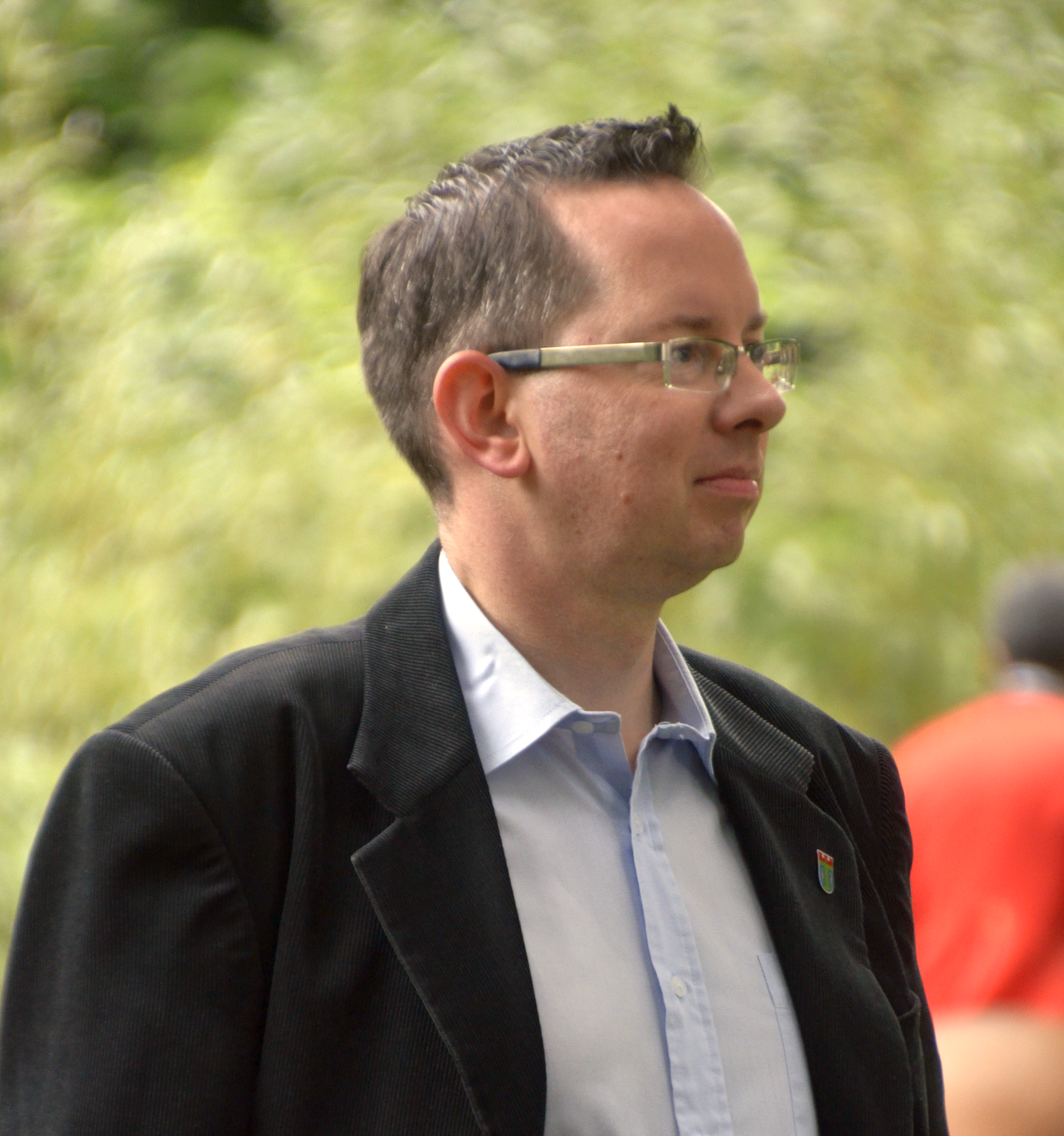 Bezirksbürgermeister Oliver Igel während der Schleppjagd in Berlin-Müggelheim